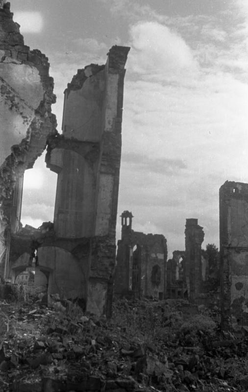 ca.1946/1947 Mainzer Studenten helfen beim Wiederaufbau in Zweibrücken